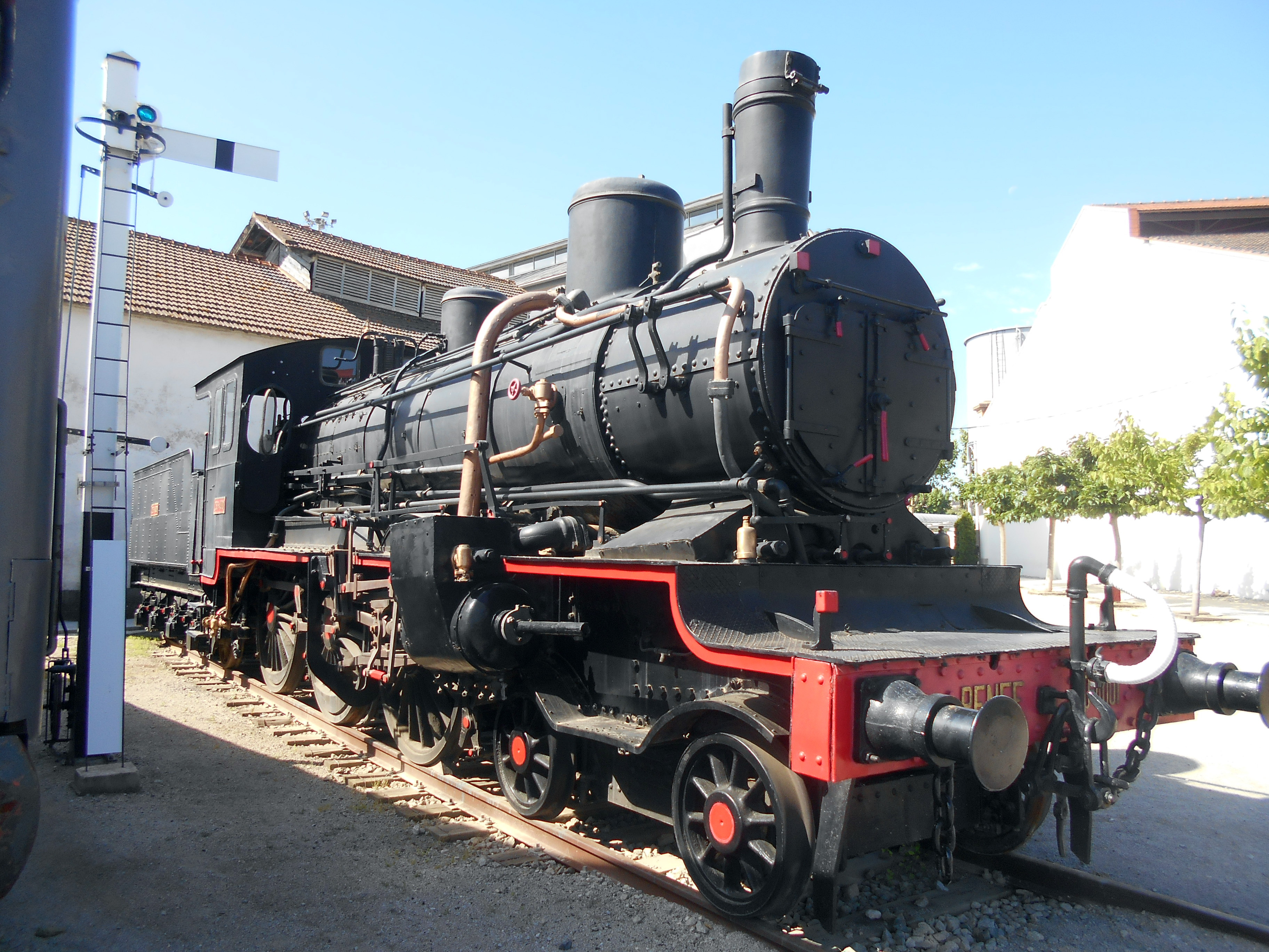 Locomotora 230-4001 MZA 651 Compound (1901).